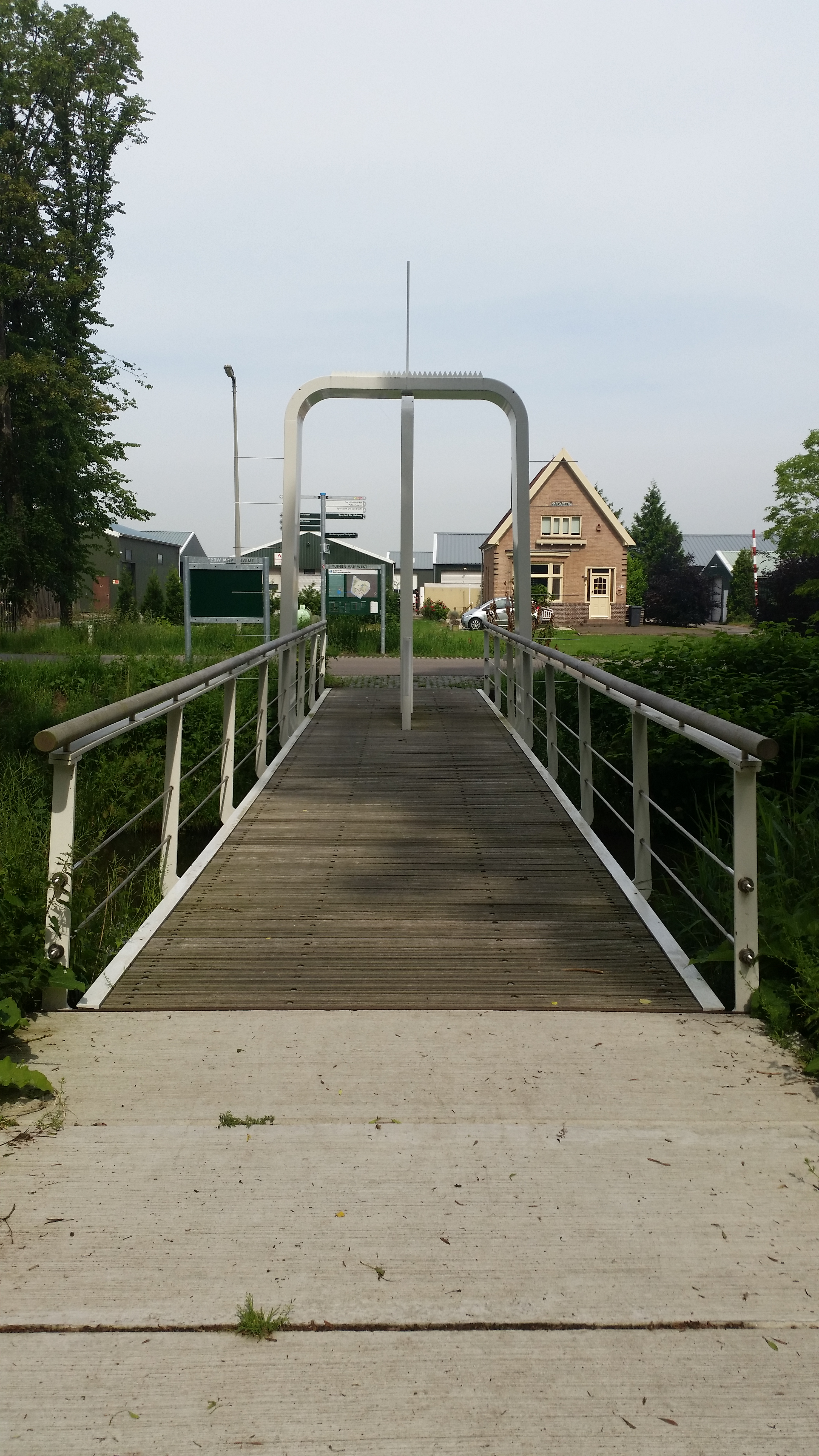 Brug 2402 nabij Westgaarde naar de Lutkemeerpolder, Amsterdam